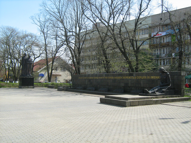 Город Виноградов Закарпатской области Украина. Мемориальный комплекс павшим в годы Великой Отечественной войны.